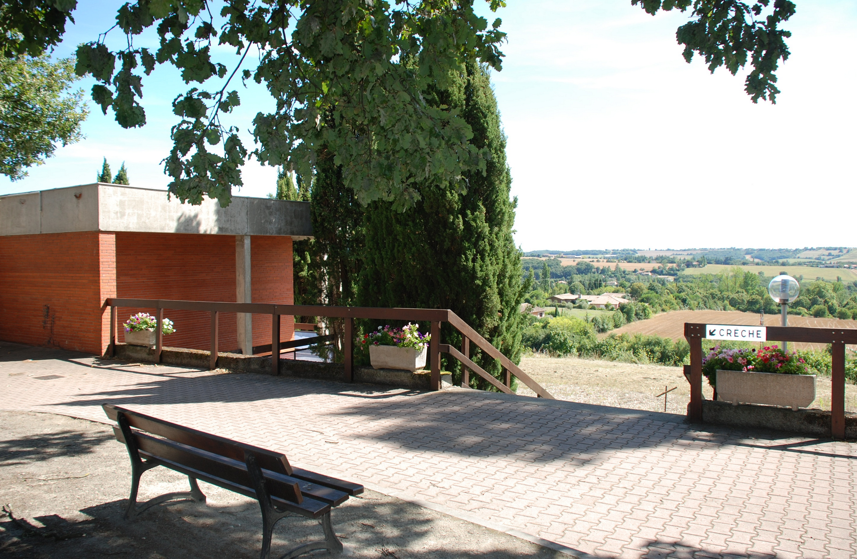 Vigoulet-Auzil (Haute-Garonne, Midi-Pyrénées, France) : Terrasse face aux Pyrénées et accès à la crèche, en face de l'église, sur l'avenue du Souleilha.